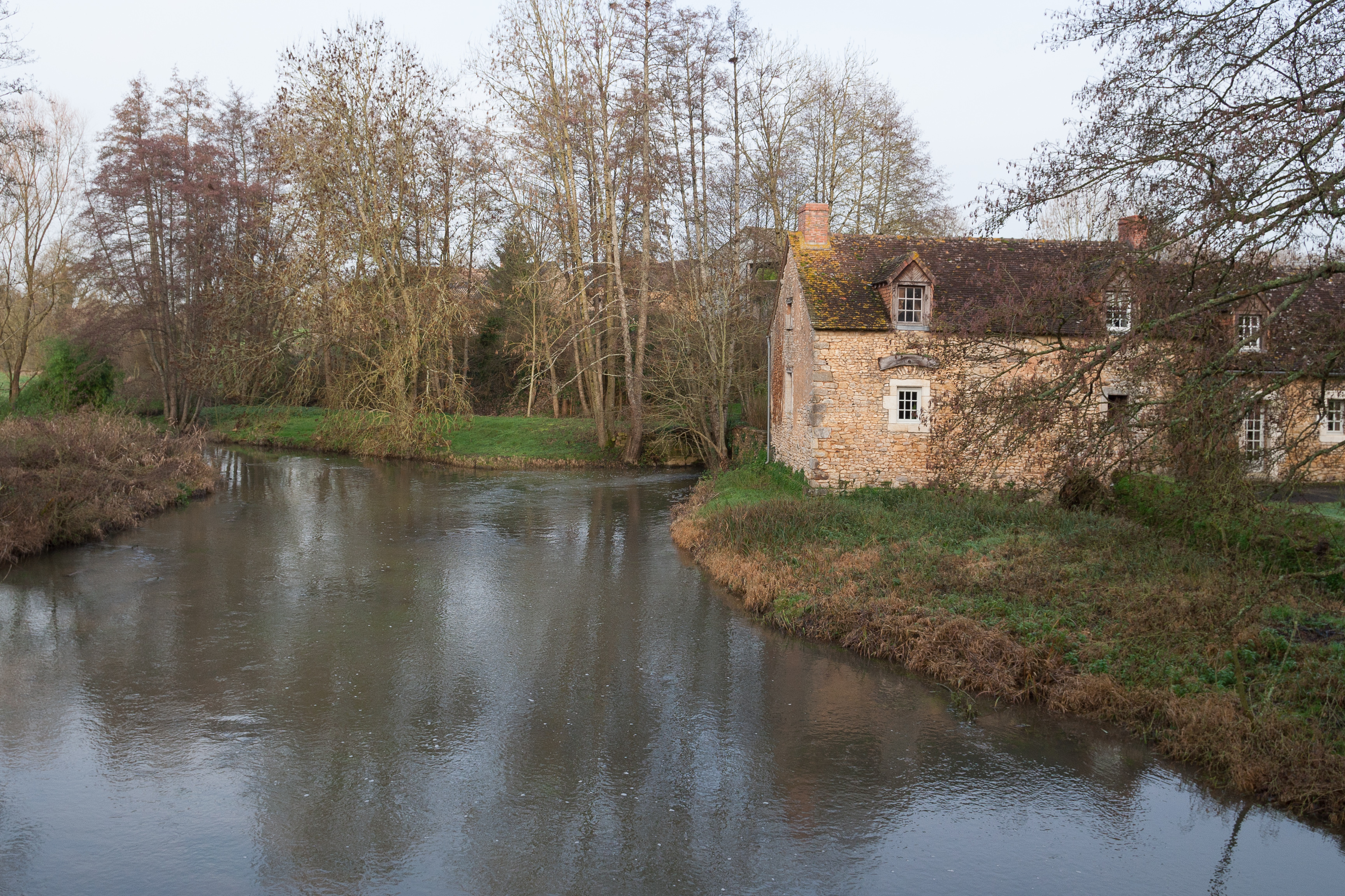 La Vègre à Ruillé-en-Champagne, au niveau du pont sur la D 95.